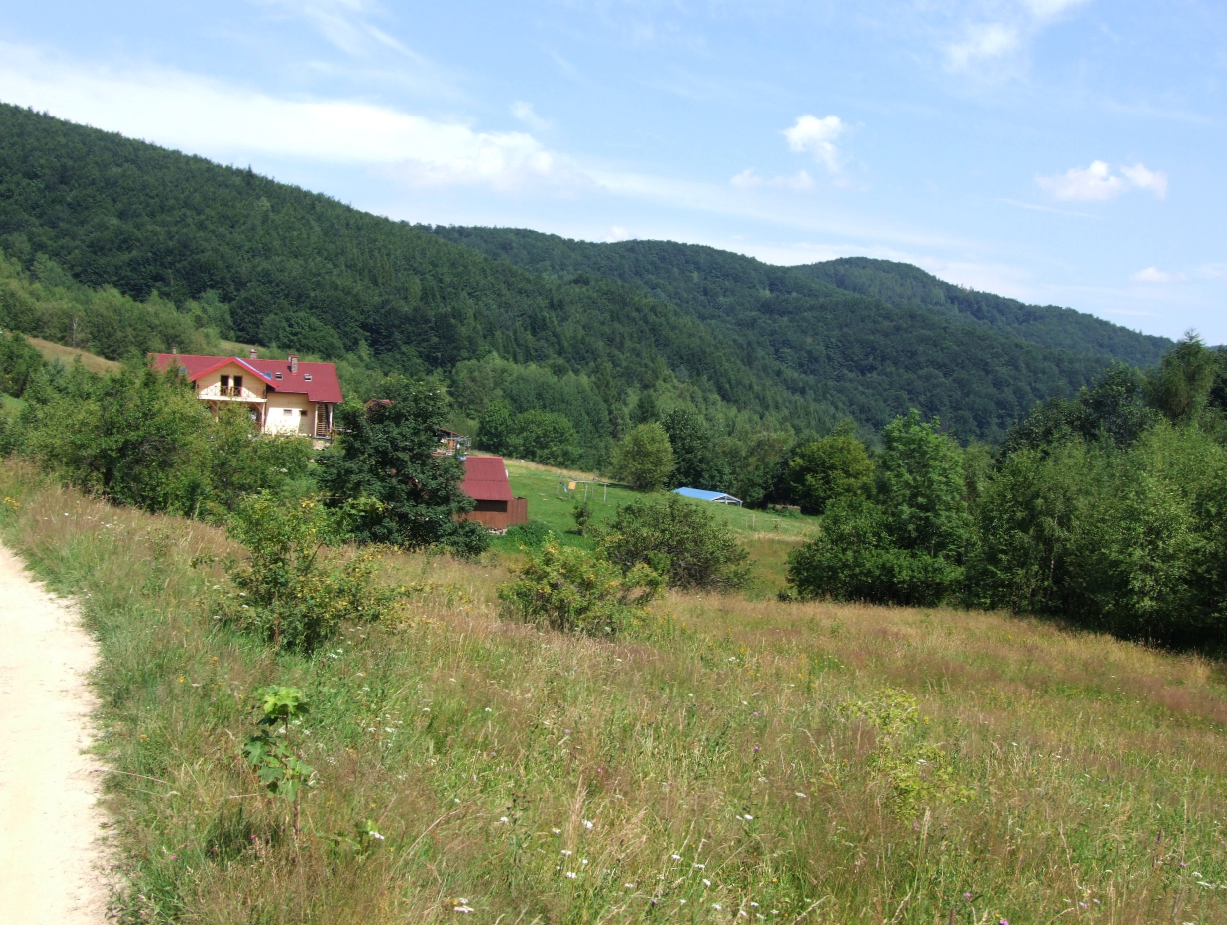 Polana Cyrla pod Makowicą i schronisko "Chata Górska Cyrla"